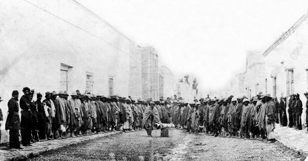 Soldados del Chacho Peñaloza tomados prisioneros por Irrazabal en la Batalla de Caucete, 1863. Inventario 24849. General Archive of the Nation Native nameArchivo General de la Nación ArgentinaParent institutionPoder Ejecutivo Nacional LocationBuenos Aires, ArgentinaCoordinates34° 36′ 17″ S, 58° 22′ 14″ W Established28 August 1821Web pageAGNAuthority control : Q2860529 VIAF: 158621023 ISNI: 0000 0001 2375 5869 LCCN: n82144709 NKC: kn20121211004 WorldCat institution QS:P195,Q2860529 This file, was provided to Wikimedia Commonsthanks to an agreement between the General Archive of the Nation of Argentina and Wikimedia Argentina.